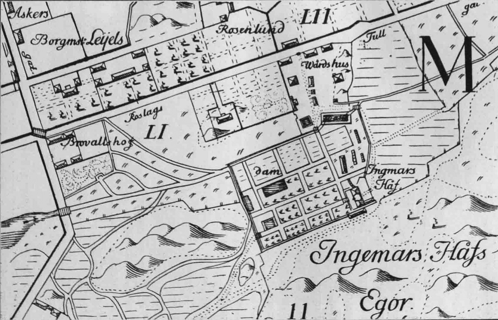 Ingemarshof enligt Petrus Tillaeus Stockholmskarta